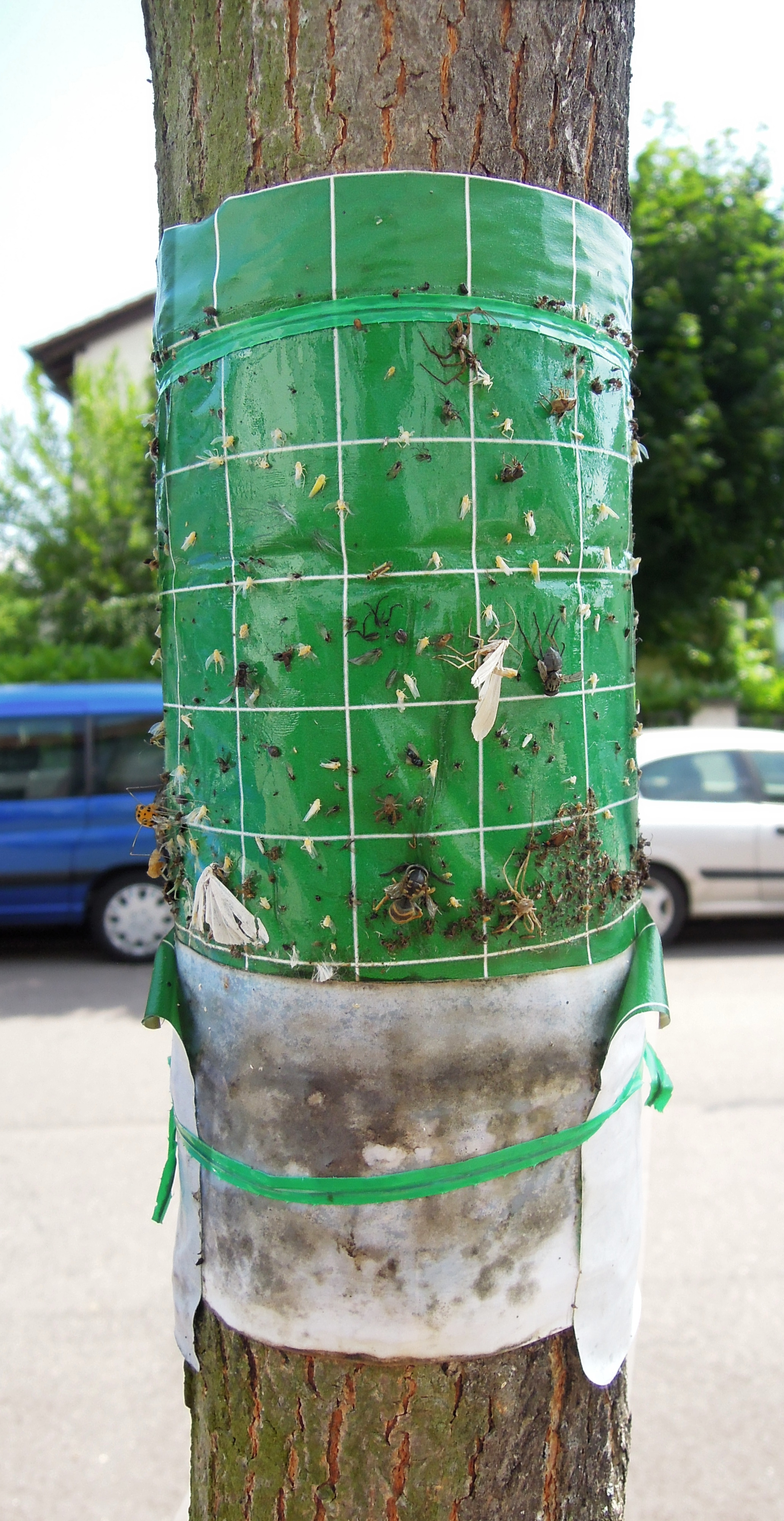 Insektenfalle